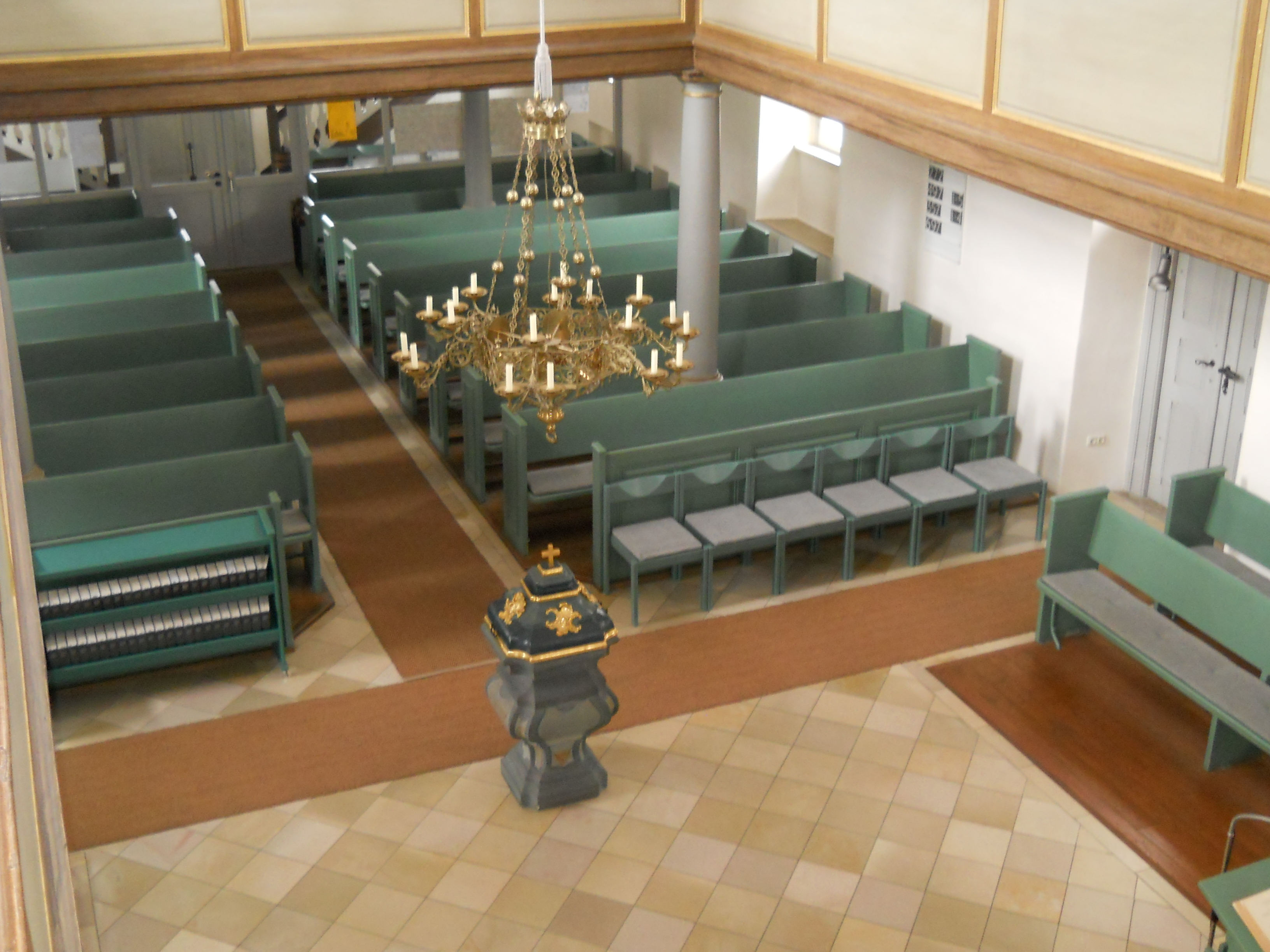 Markgrafenkirche Treuchtlingen (Landkreis Weißenburg-Gunzenhausen in Bayern), das Taufbecken unter dem Kronleuchter